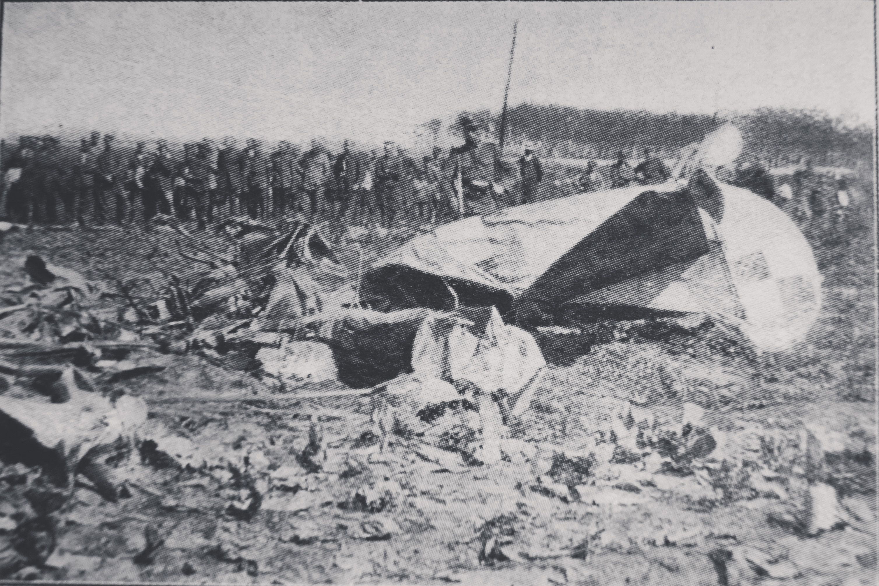 Śmierć kpt. Stefana Bastyra d-cy 6-ej eskadry wywiadowczej w katastrofie samolotu 6 sierpnia 1920 we Lwowie